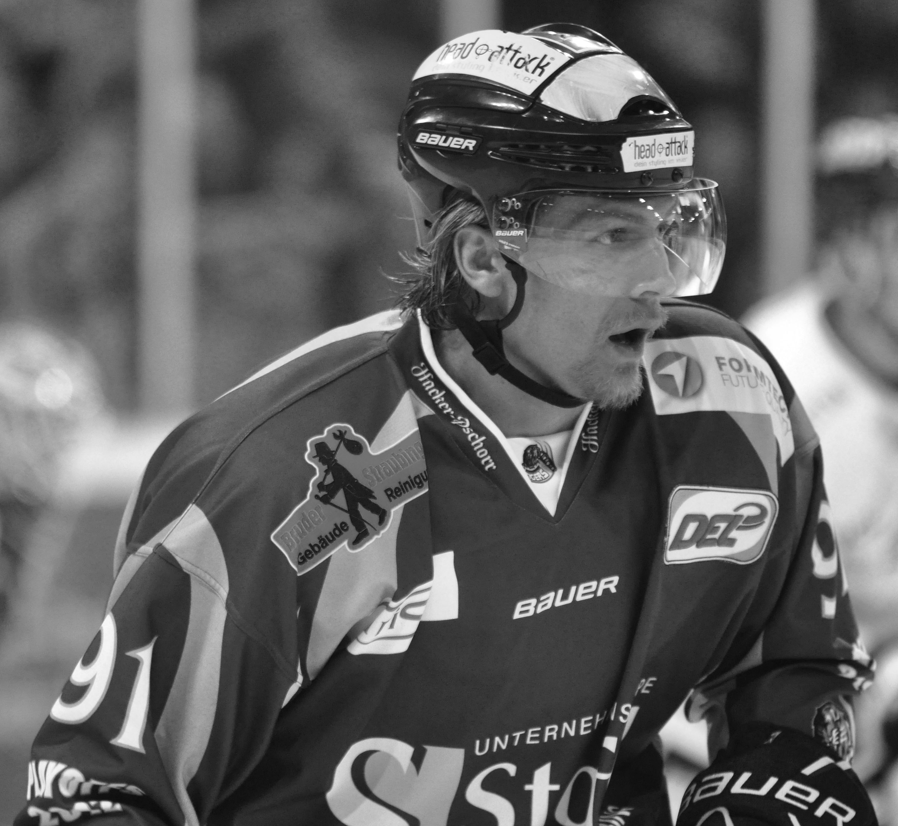 Straubing Tigers - Eisbären Berlin 11.04.2012 DEL PlayOff Halbfinale